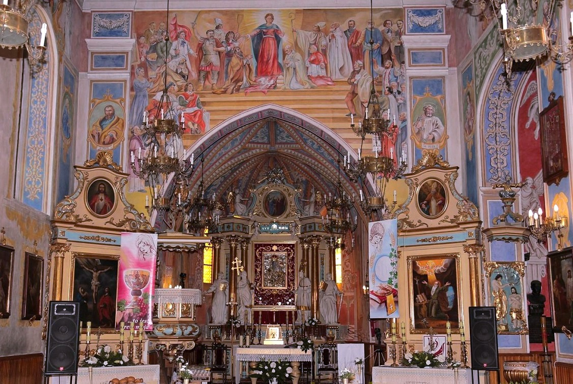 Wnętrze sanktuarium MB Zwycięskiej w Brdowie.